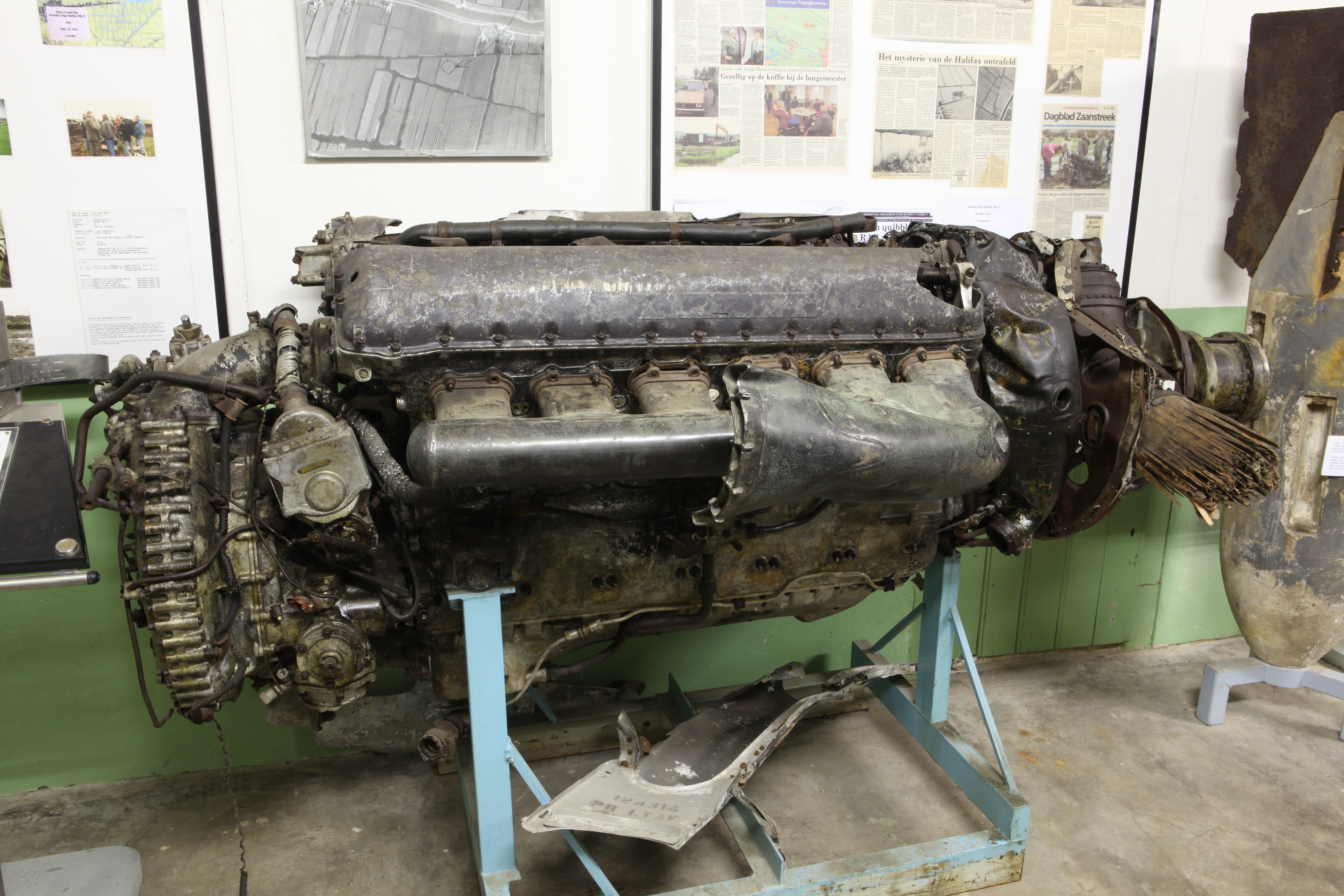 at Luchtoorlogsmuseum Fort bij Veldhuis Genieweg 1 1967 PS HEEMSKERK